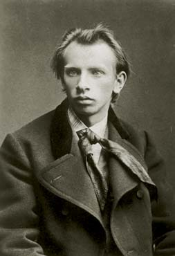 Jaroslav Vrchlicky